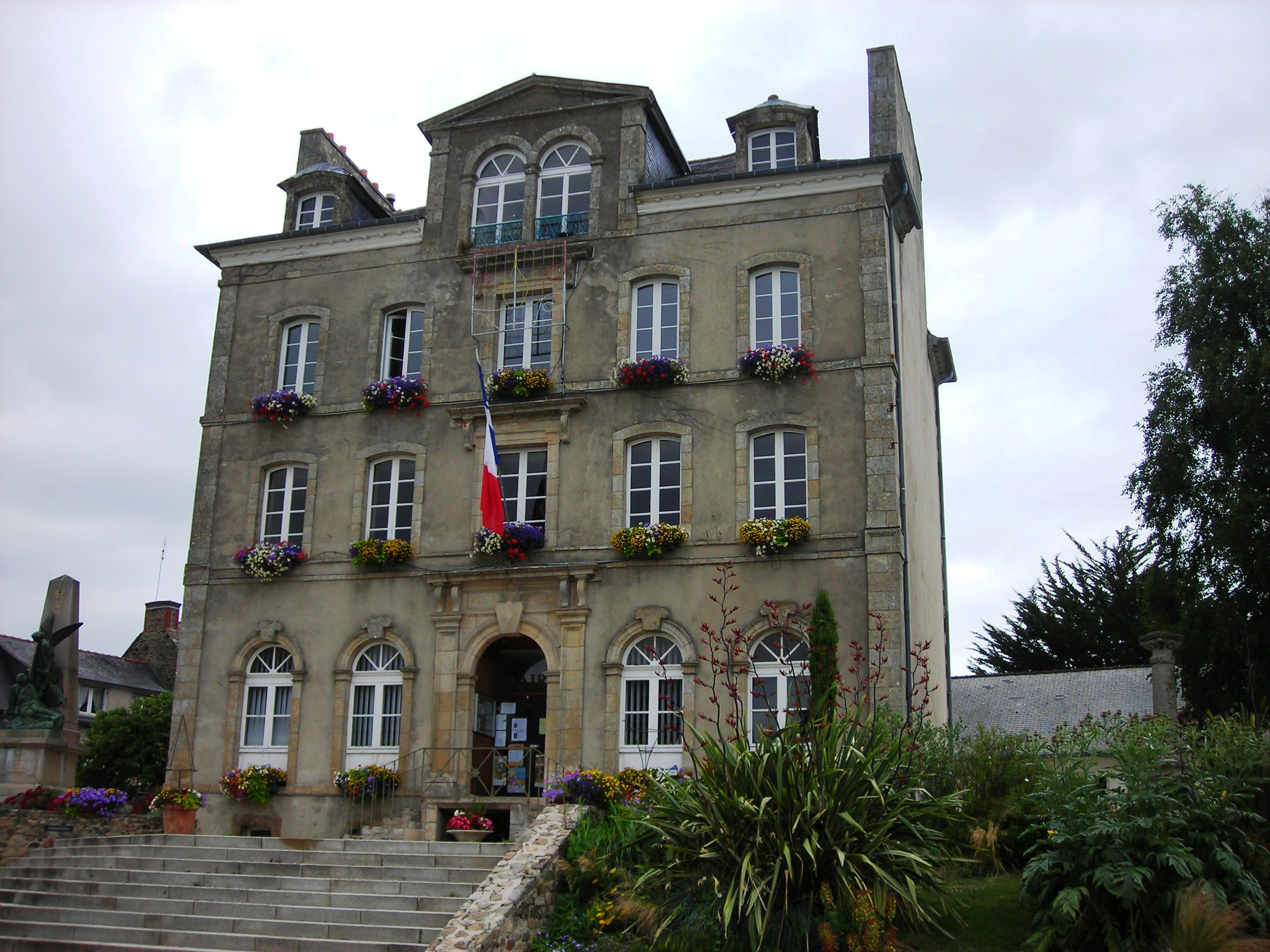 Mairie de Corseul (Bretagne).